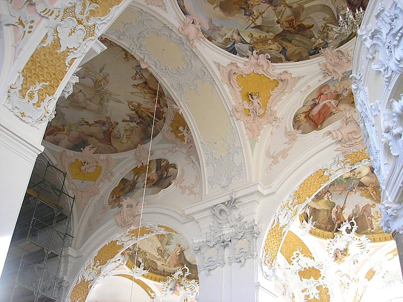 Wallfahrtskirche Herrgottsruh (Friedberg, Landkreis Aichach Friedberg, Bayerisch-Schwaben). Mittelschiff, Blick ins Gewölbe. Eigene Aufnahme, Jan. 2007 / Pilgrimage church "Herrgottsruh" (Friedberg, Bavaria, Germany). The nave. Own photo, Jan. 2007